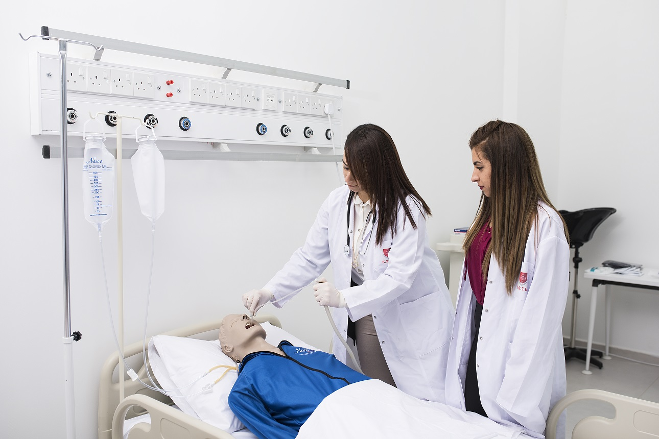 KSTU Sağlık Laboratuvarları